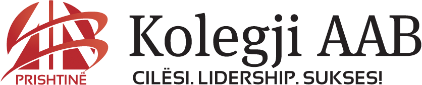 Logo e Kolegjit